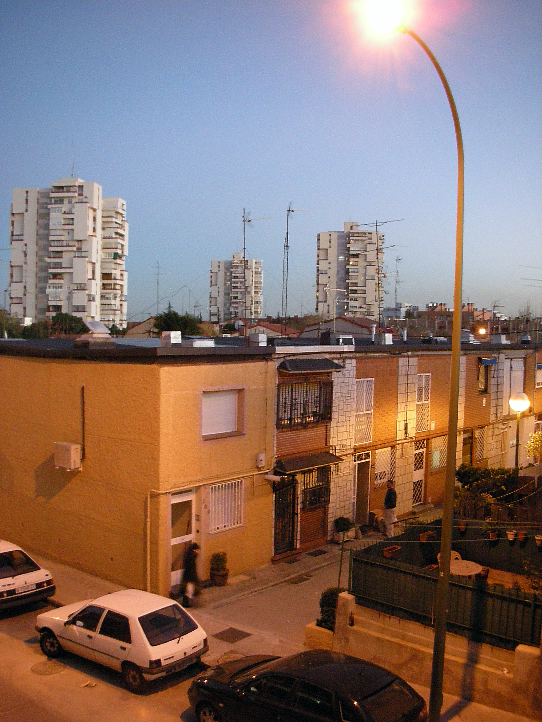 Canillas, distrito de Hortaleza, Madrid, España.